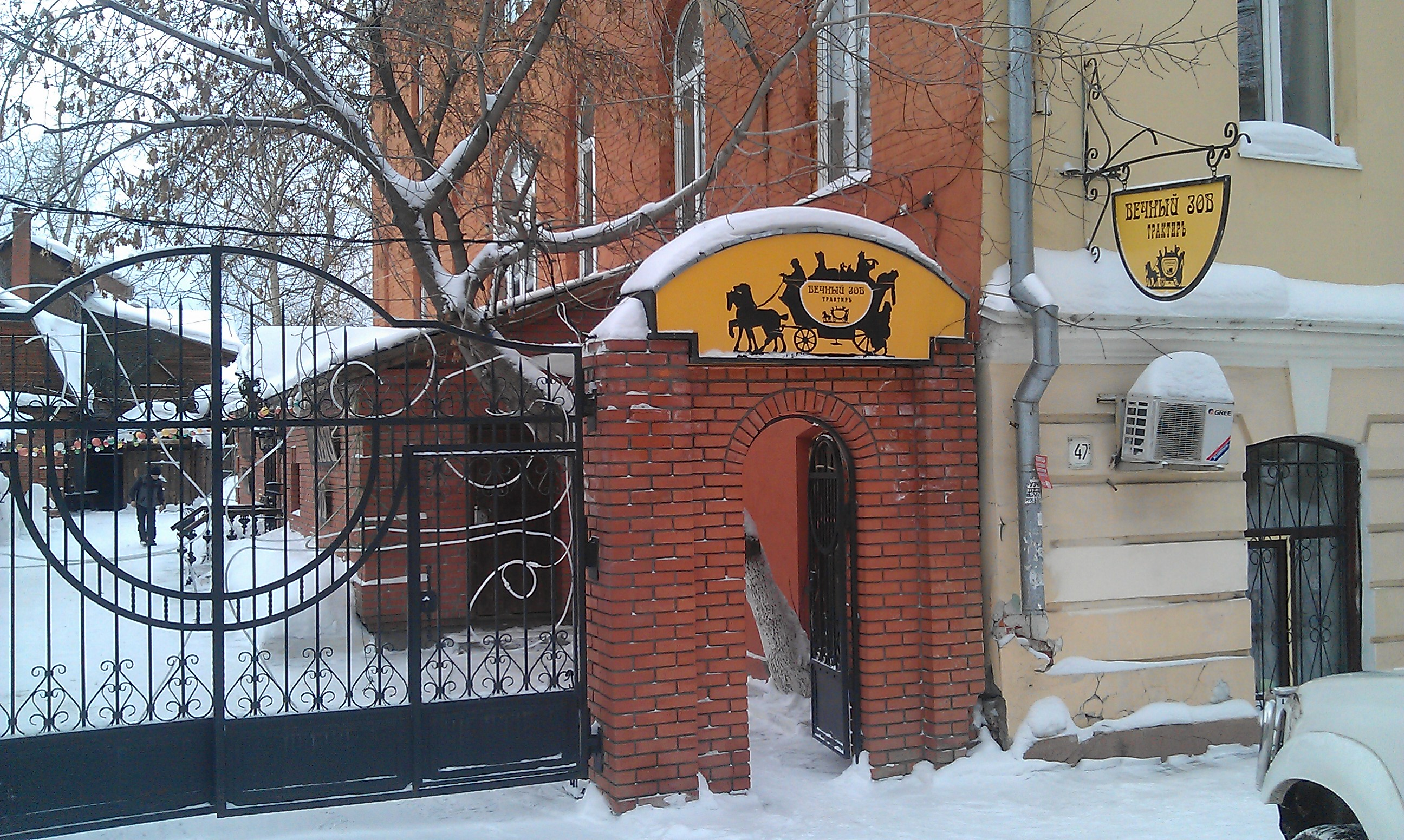 Ресторан "Вечный зов" (Томск). Бывшее Исправительно-арестантское отделение (арестантские роты).